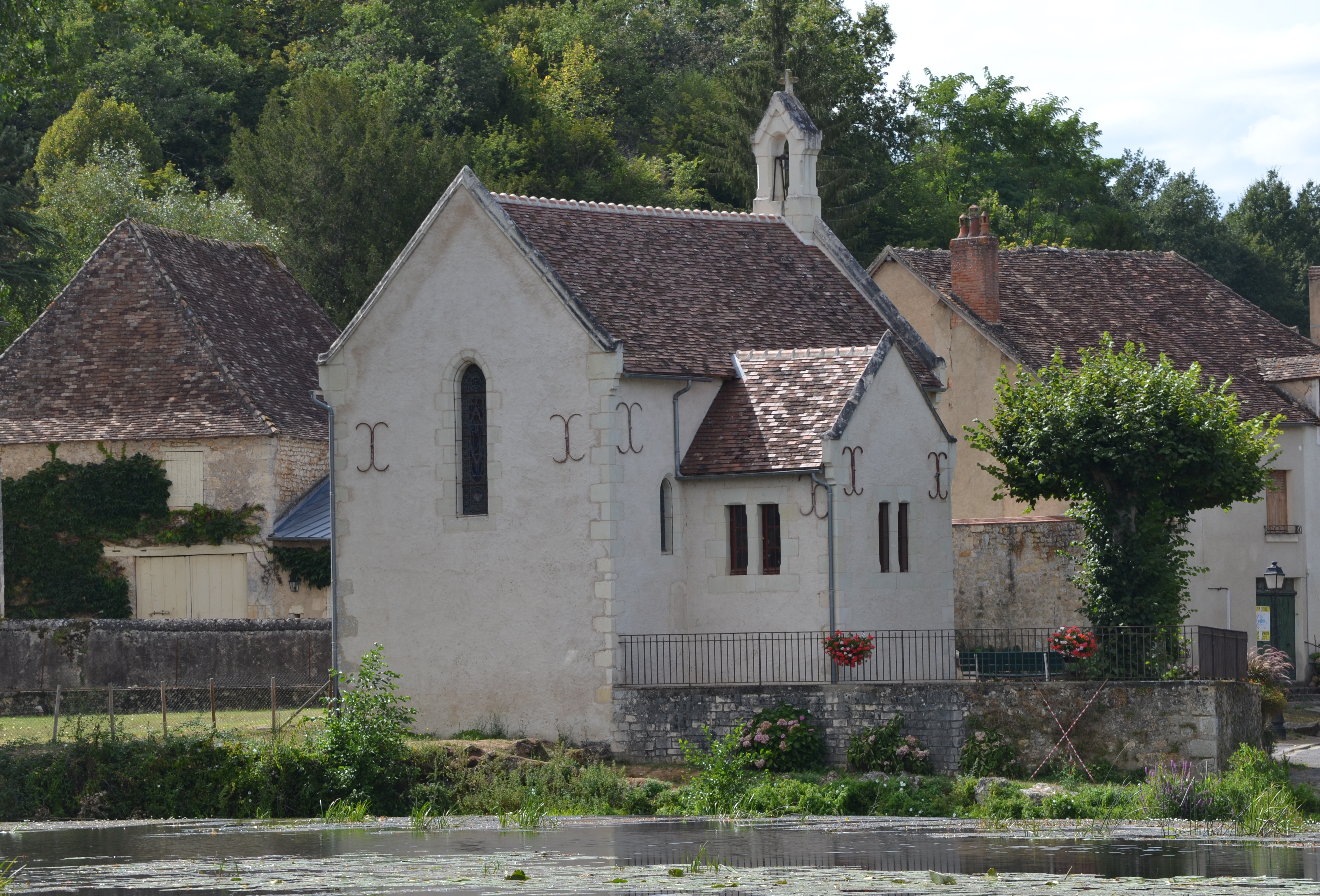 Chapelle votive située sur la rive gauche de la Gartempe à Saint-Pierre-de-Maillé